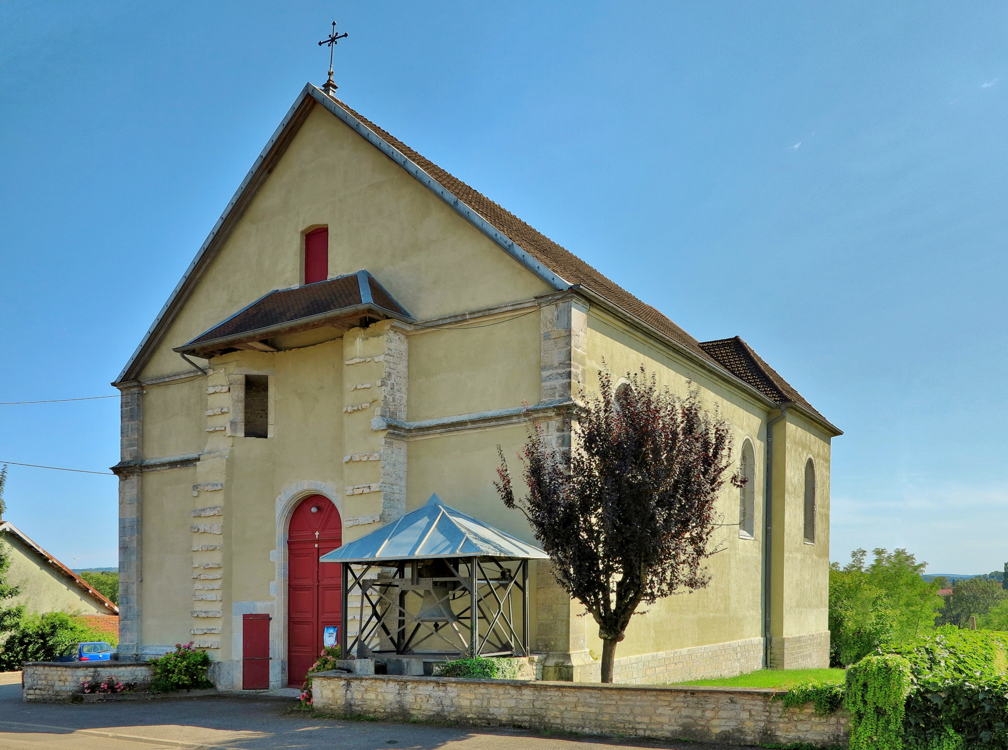 L'église